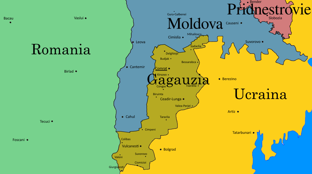 Республика Гагаузия 1990 год